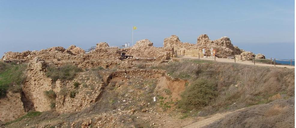 ארסוף